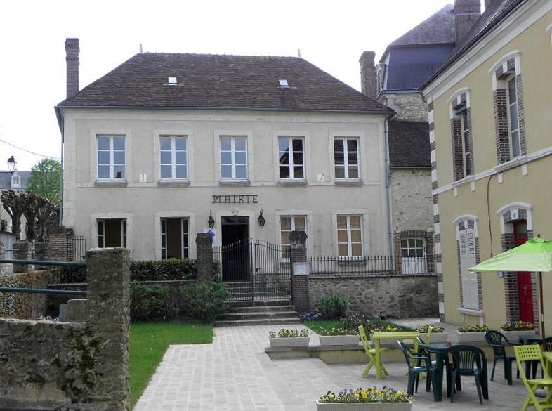 Mairie de La Chapelle-Montligeon (61).